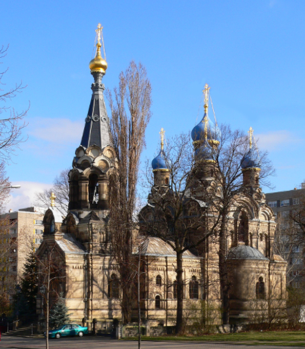 Православная церковь в Дрездене